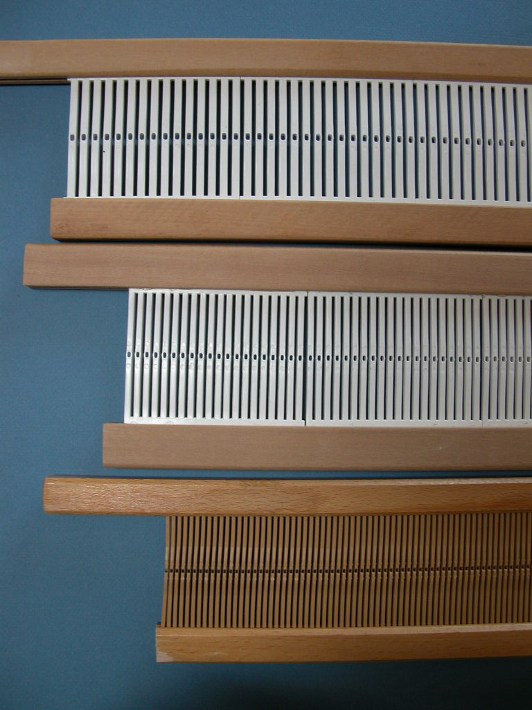 Foto mia personale, pettini-liccio R 6/4/3 Licensing Categoria:Immagini sulla tessitura